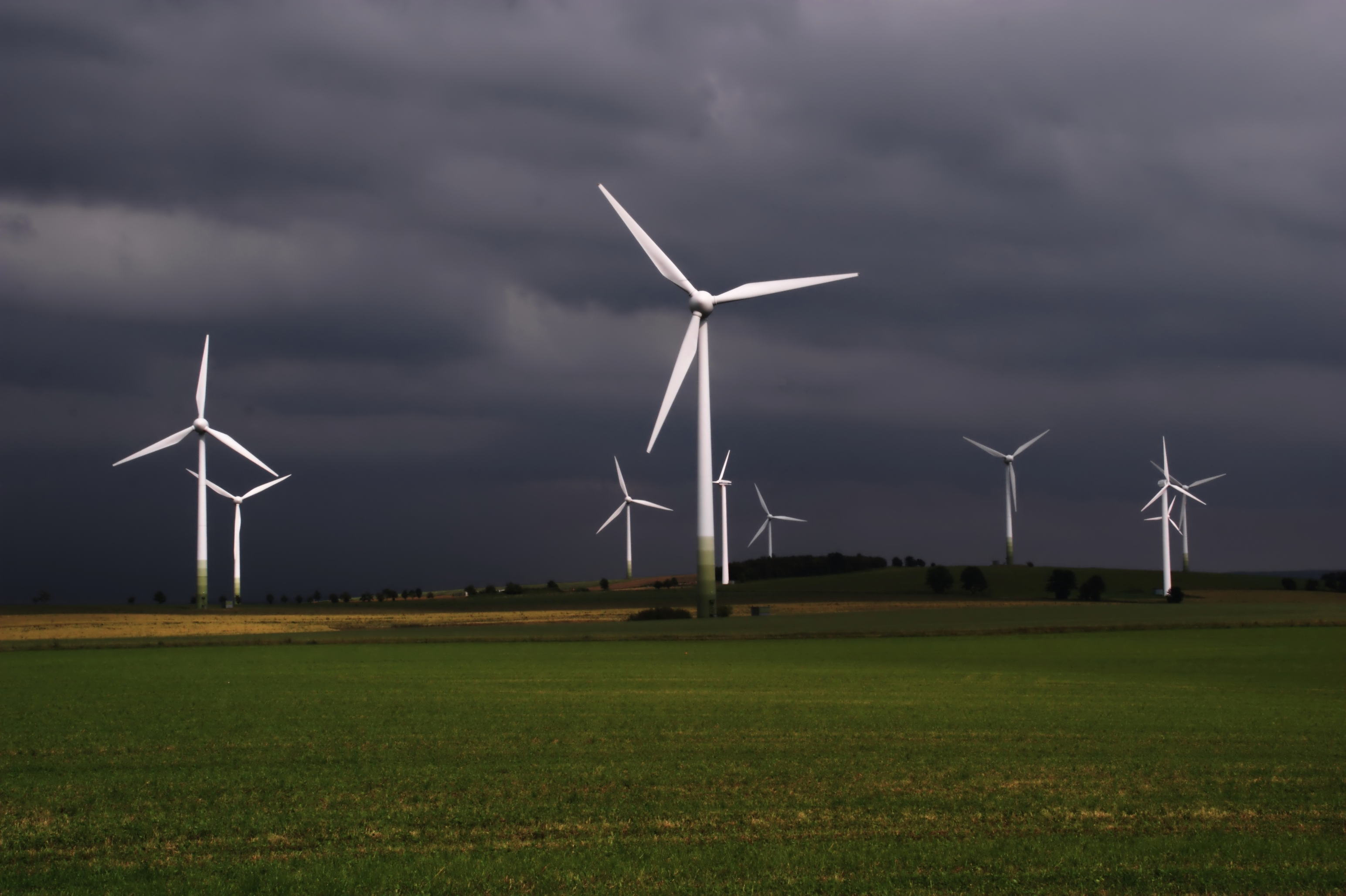 Windpark bei Pfaffroda (Ortsteil Dörnthal) in Sachsen